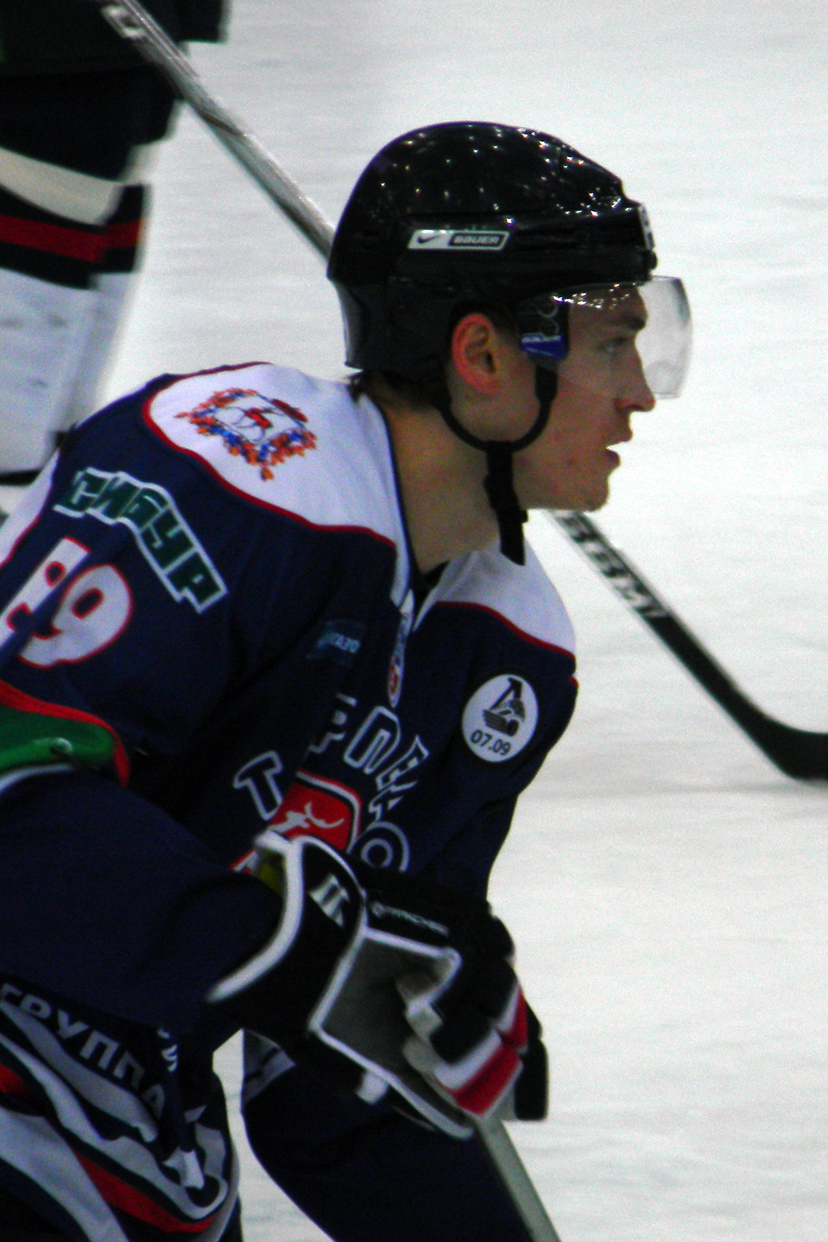 Alexei Potapov, a hockey player from Torpedo Nizhny Novgorod